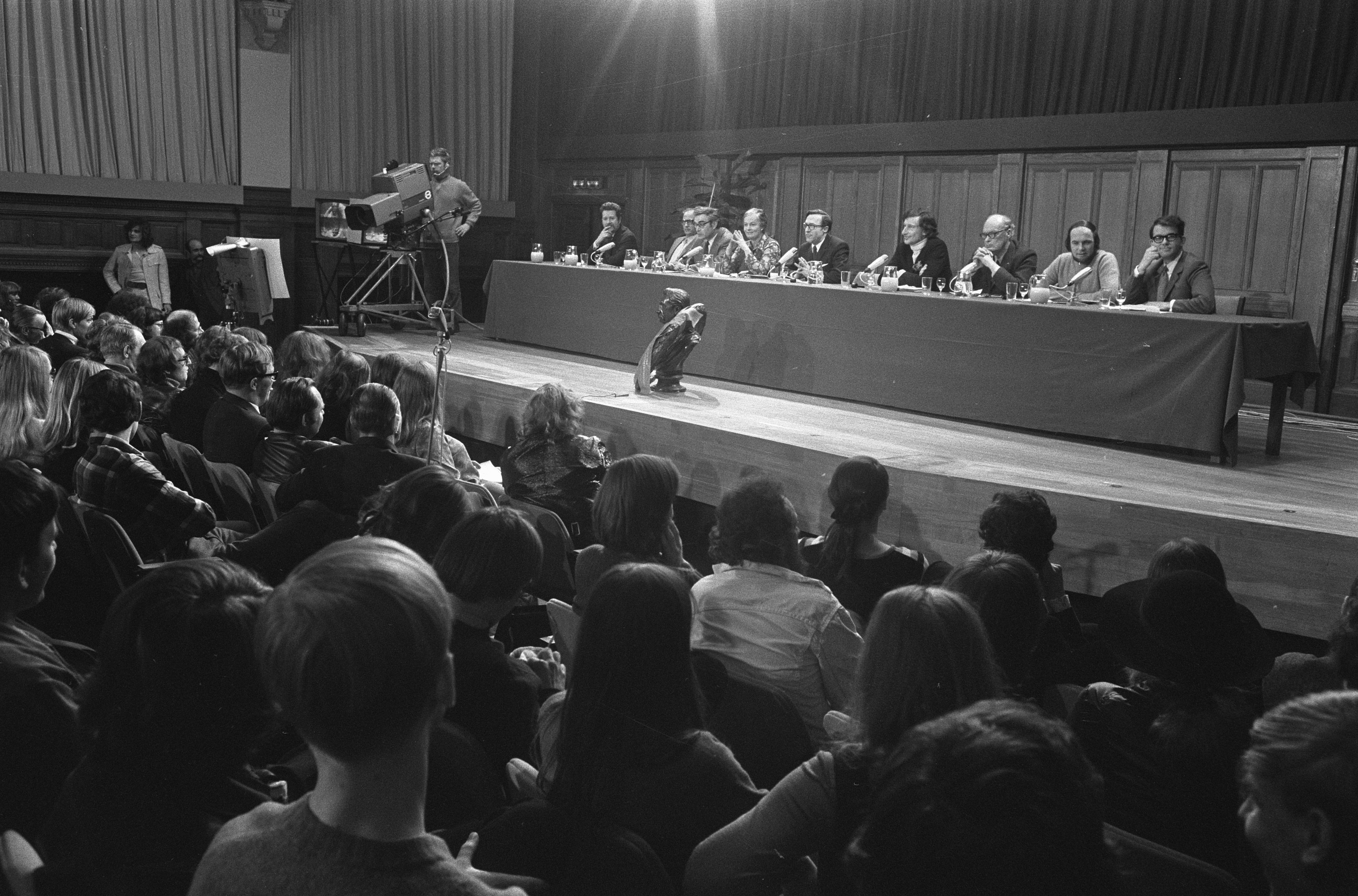 Collectie / Archief : Fotocollectie Anefo Reportage / Serie : [ onbekend ] Beschrijving : Maatschappij Nederlandse Letterkunde houdt discussie met kunstenaars in Koninklijk Instituut voor Tropen Adam Overzicht Datum : 9 april 1970 Locatie : Amsterdam, Noord-Holland Trefwoorden : KUNSTENAARS, discussies, overzichten Instellingsnaam : Koninklijk Instituut voor de Tropen Fotograaf : Koch, Eric / Anefo Auteursrechthebbende : Nationaal Archief Materiaalsoort : Negatief (zwart/wit) Nummer archiefinventaris : bekijk toegang 2.24.01.05 Bestanddeelnummer : 923-4234